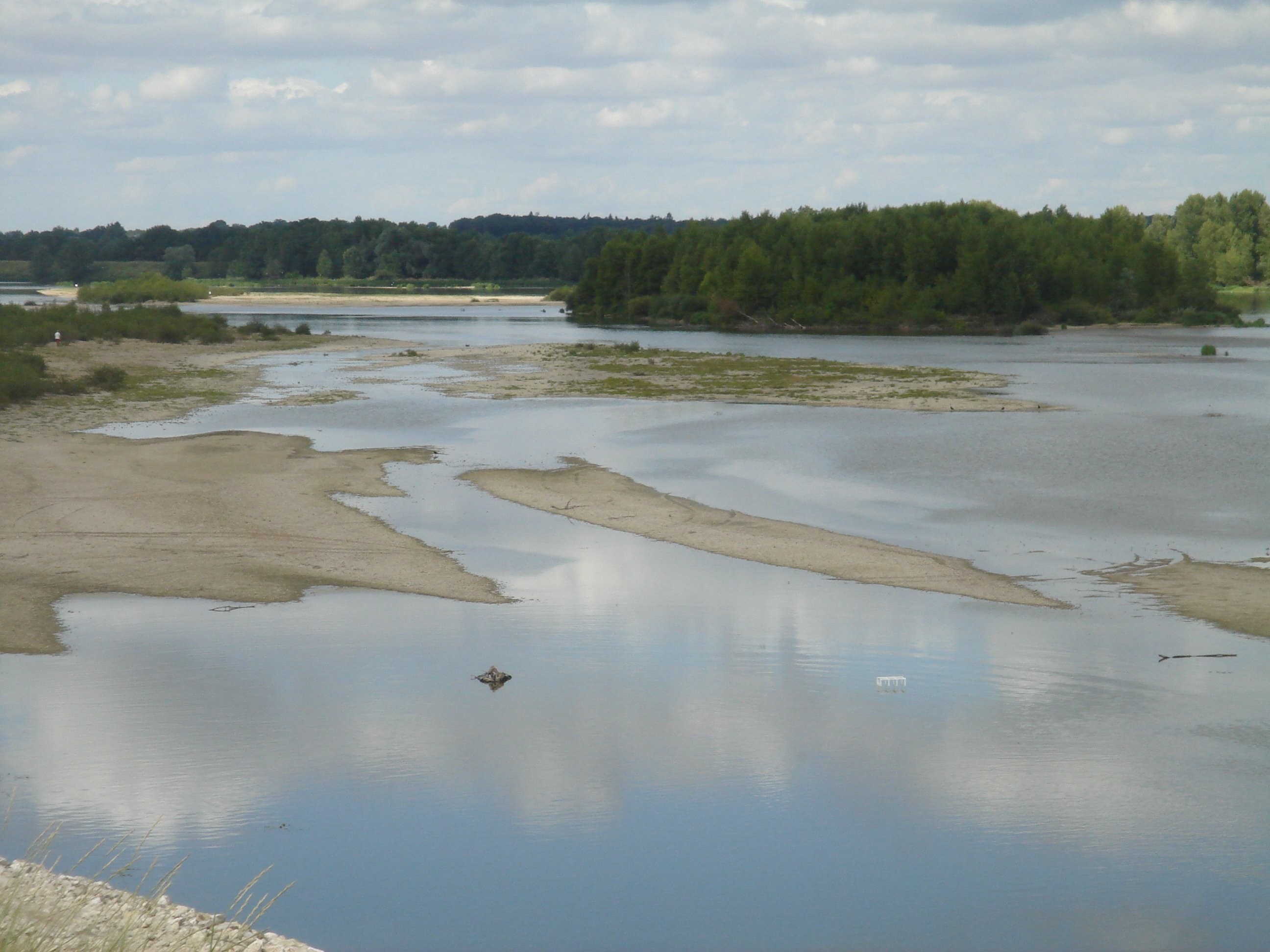 Bord de Loire à Sandillon, Loiret, Centre, France